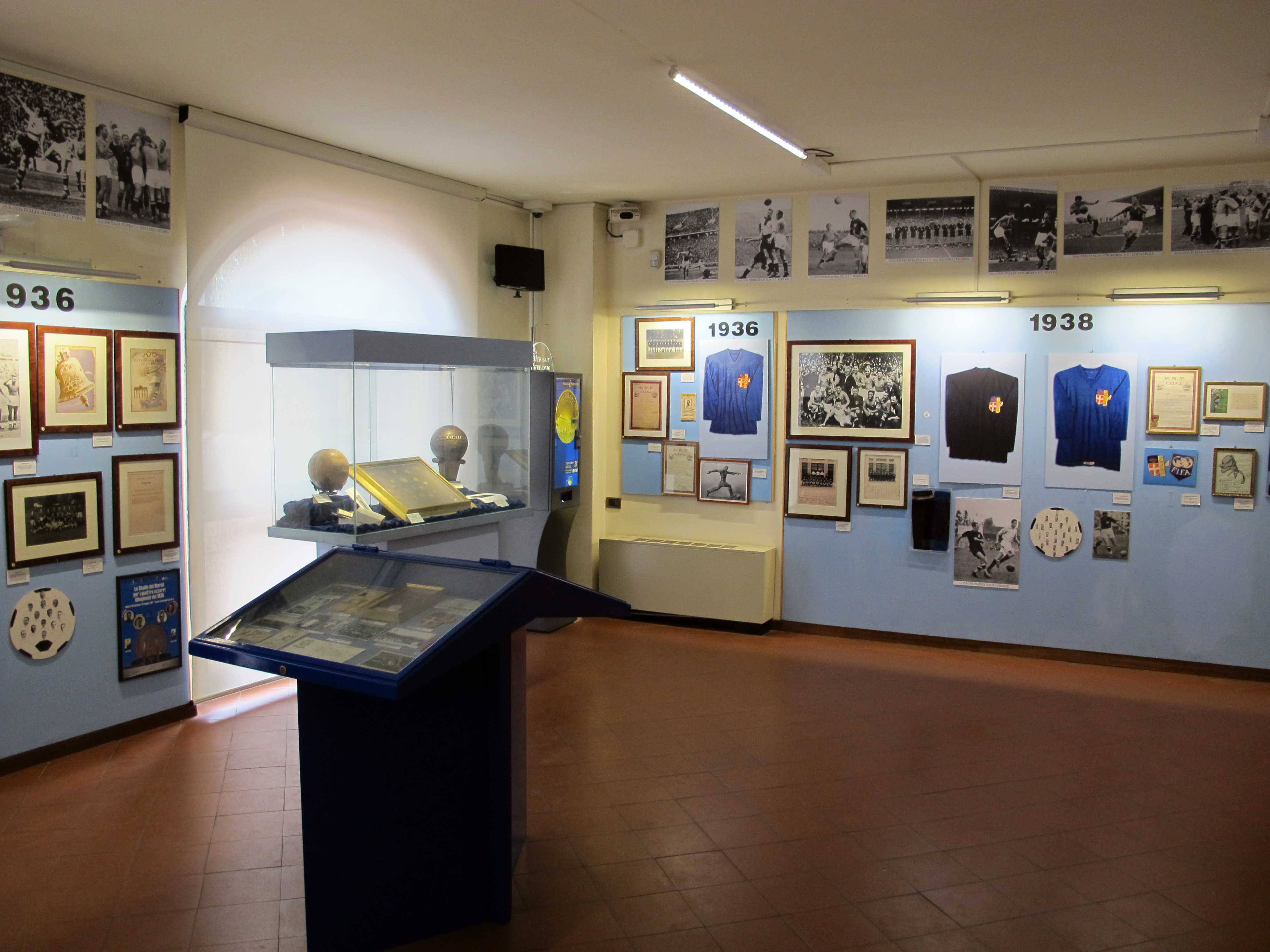 Museo del Calcio, Firenze